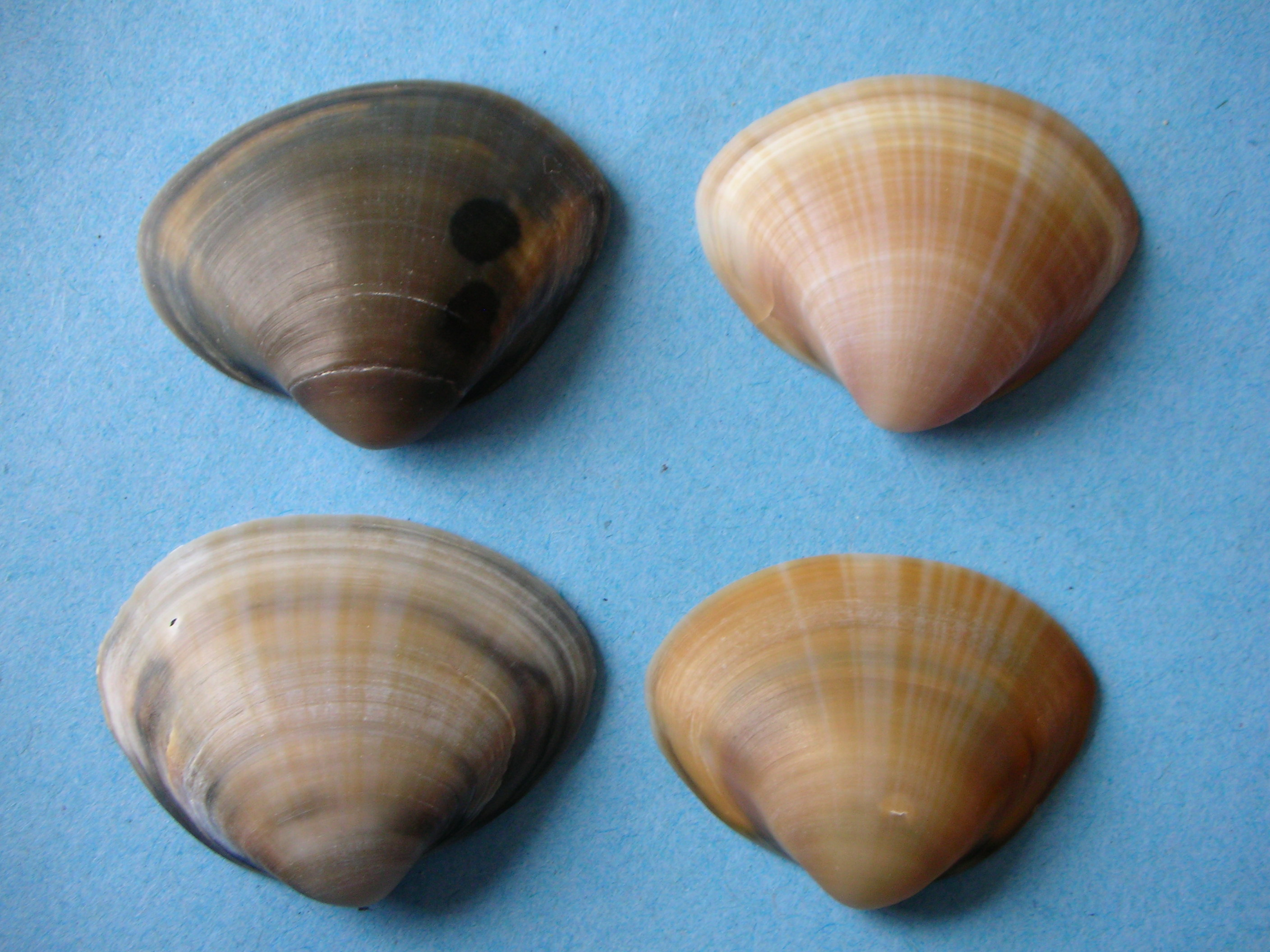 Mactra stultorum, loc. Torregaveta, Bacoli (NA) Italy